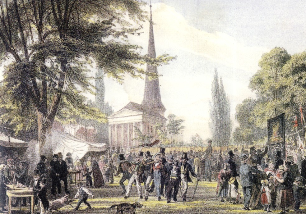 Wandsbeker Markt in Hamburg um 1890 mit der alten Christuskirche (1896 abgebrannt).